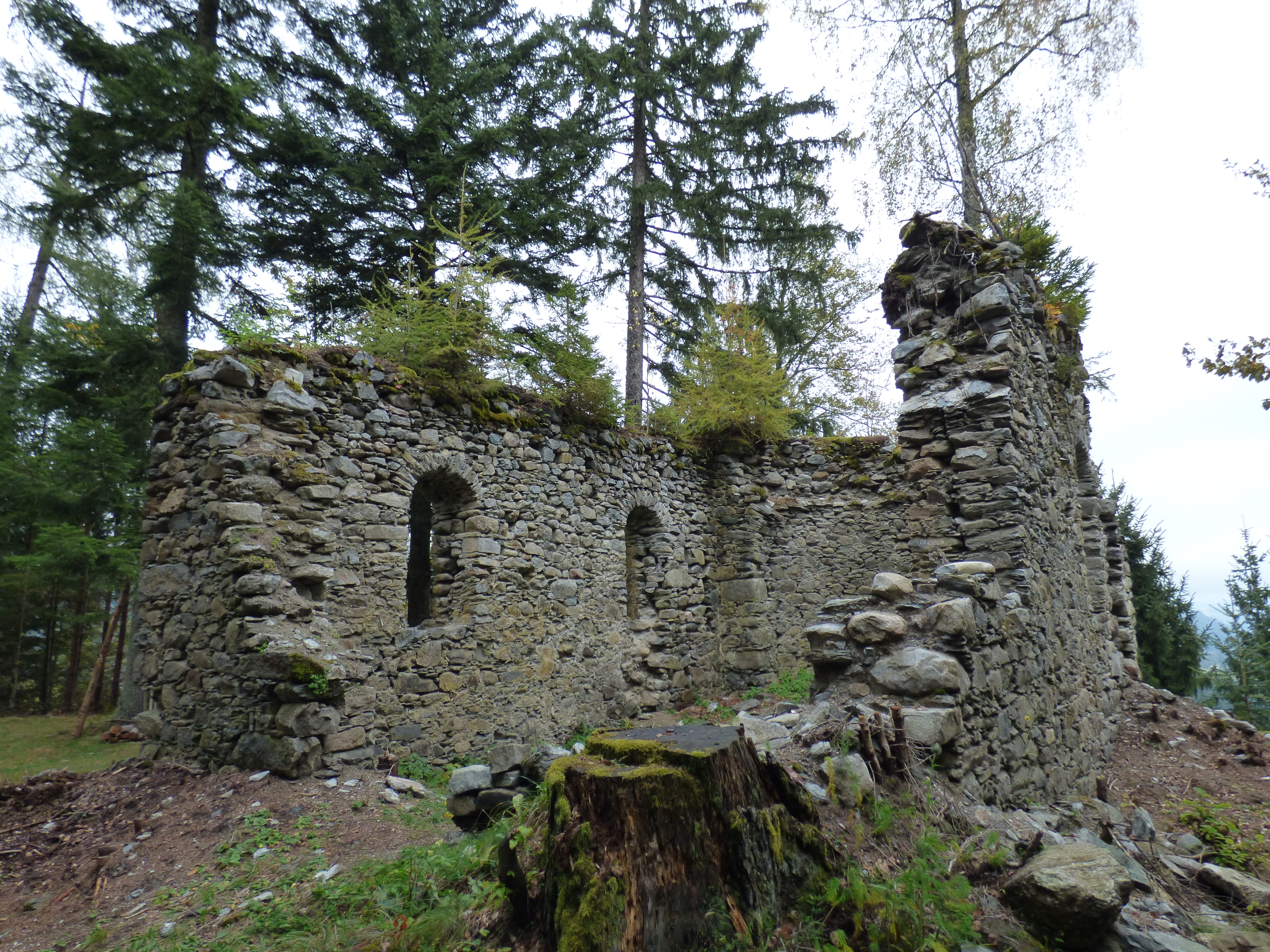 Burgruine Steuerberg (Marbauerschloss), Gemeinde Steuerberg, Kärnten. Burgkapelle